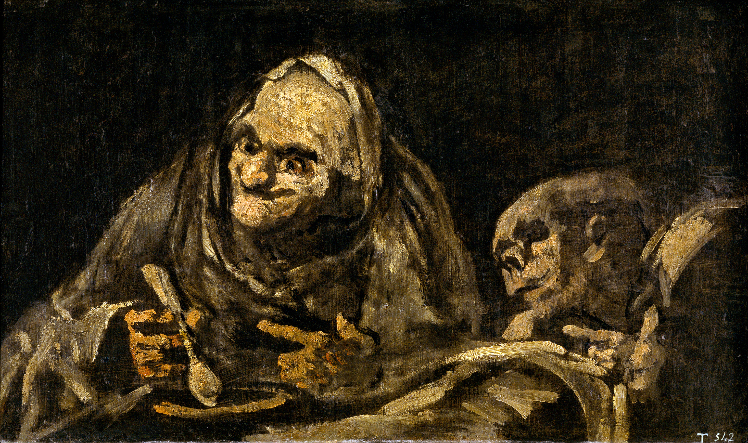 Viejos comiendo sopa. Óleo sobre muro trasladado a lienzo. 49,3 x 83,4 cm.